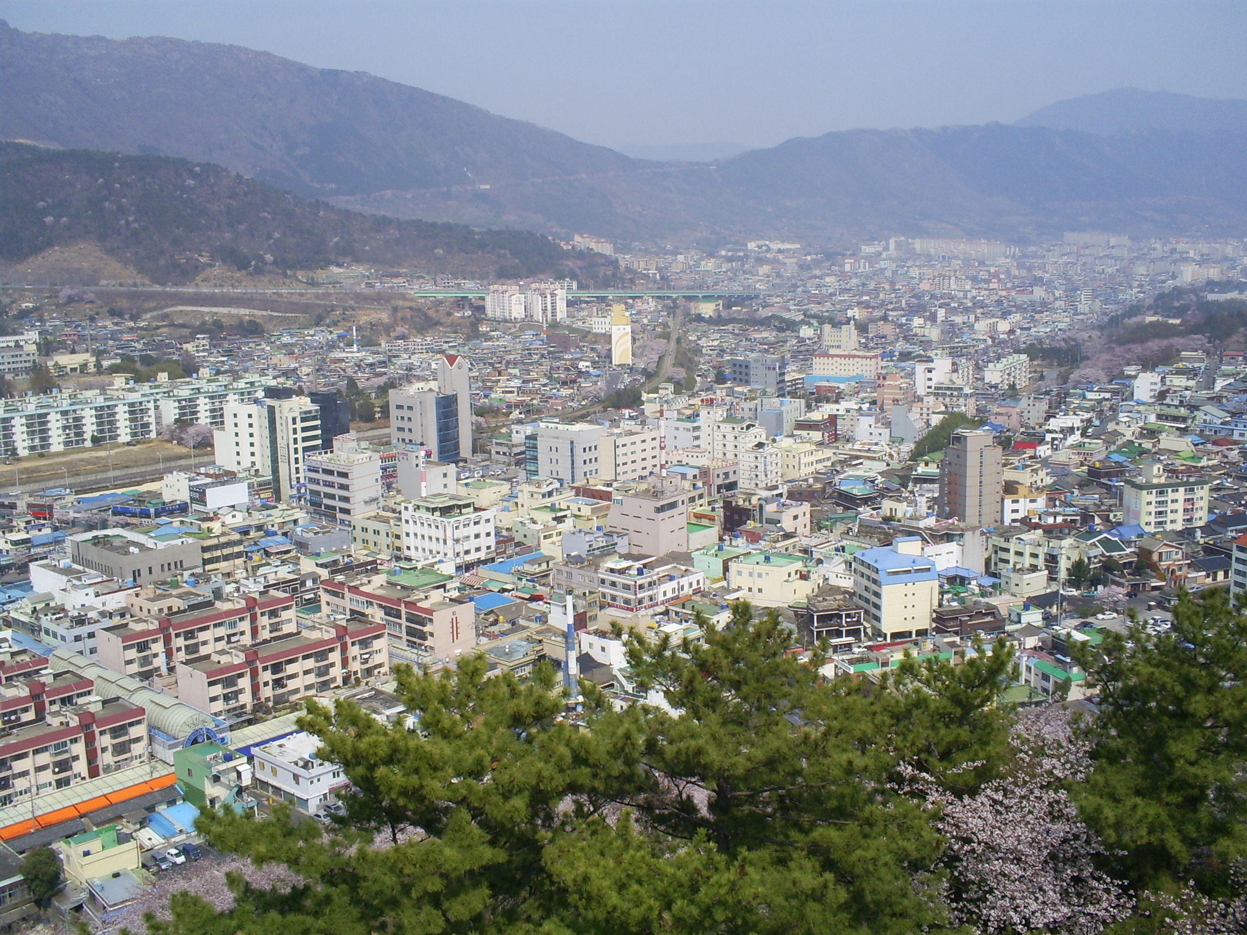 제황산공원 내 진해탑에서 내려다 본 진해시의 모습